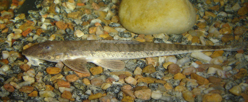 Rineloricaria longicauda FishBase